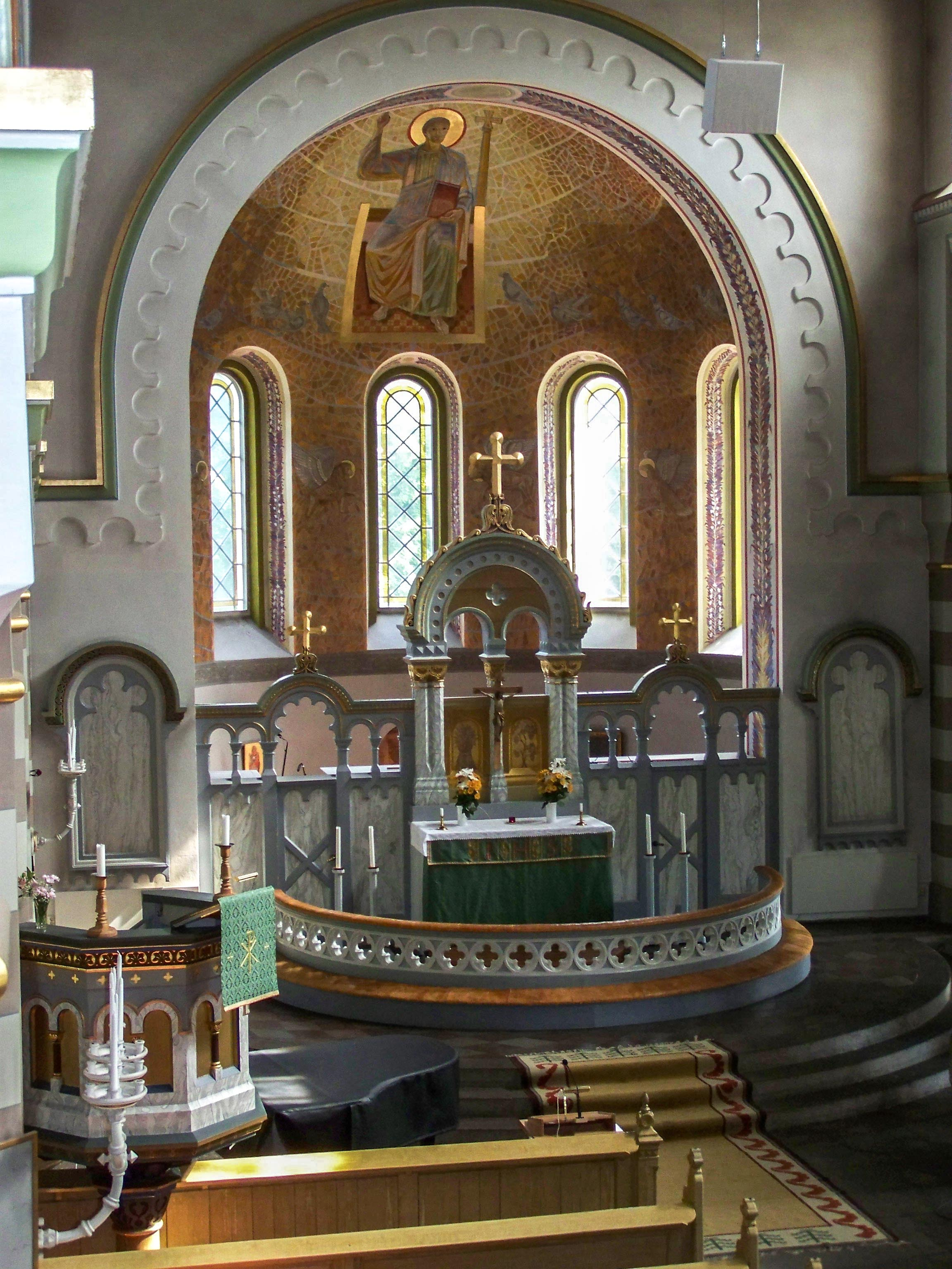 Bräkne-Hoby,_Kirche_Kanzel, Chor, Altar